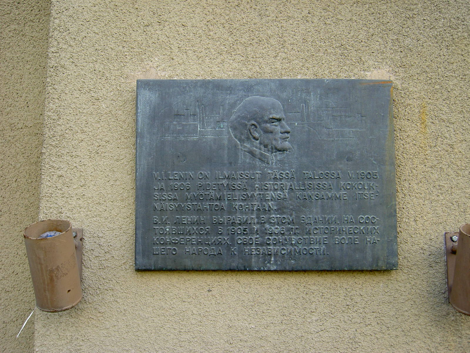 Lenin-museum in Tampere, Finland.